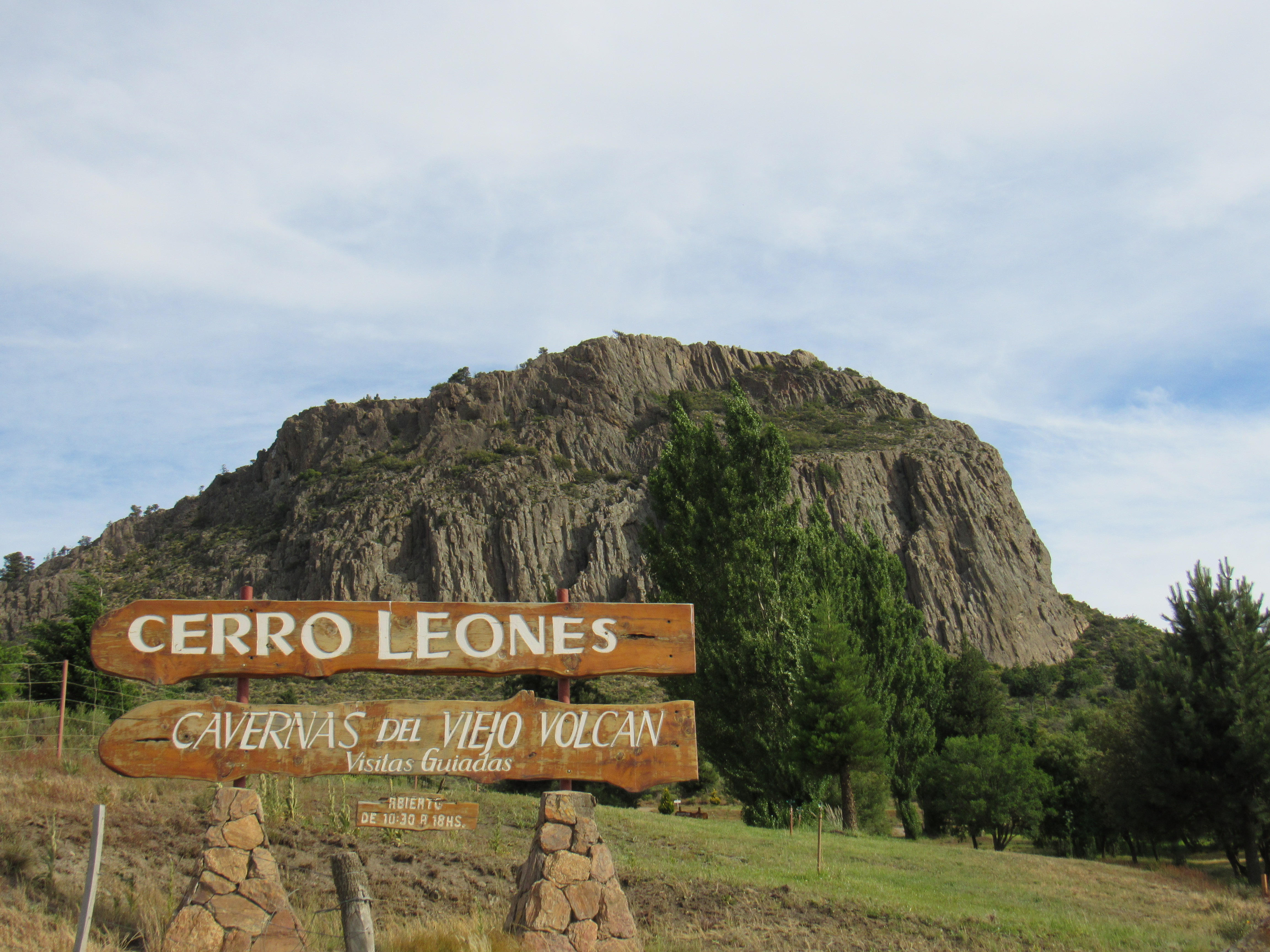 Ingreso a Cerro Leones, Dina Huapi, Río Negro, Argentina